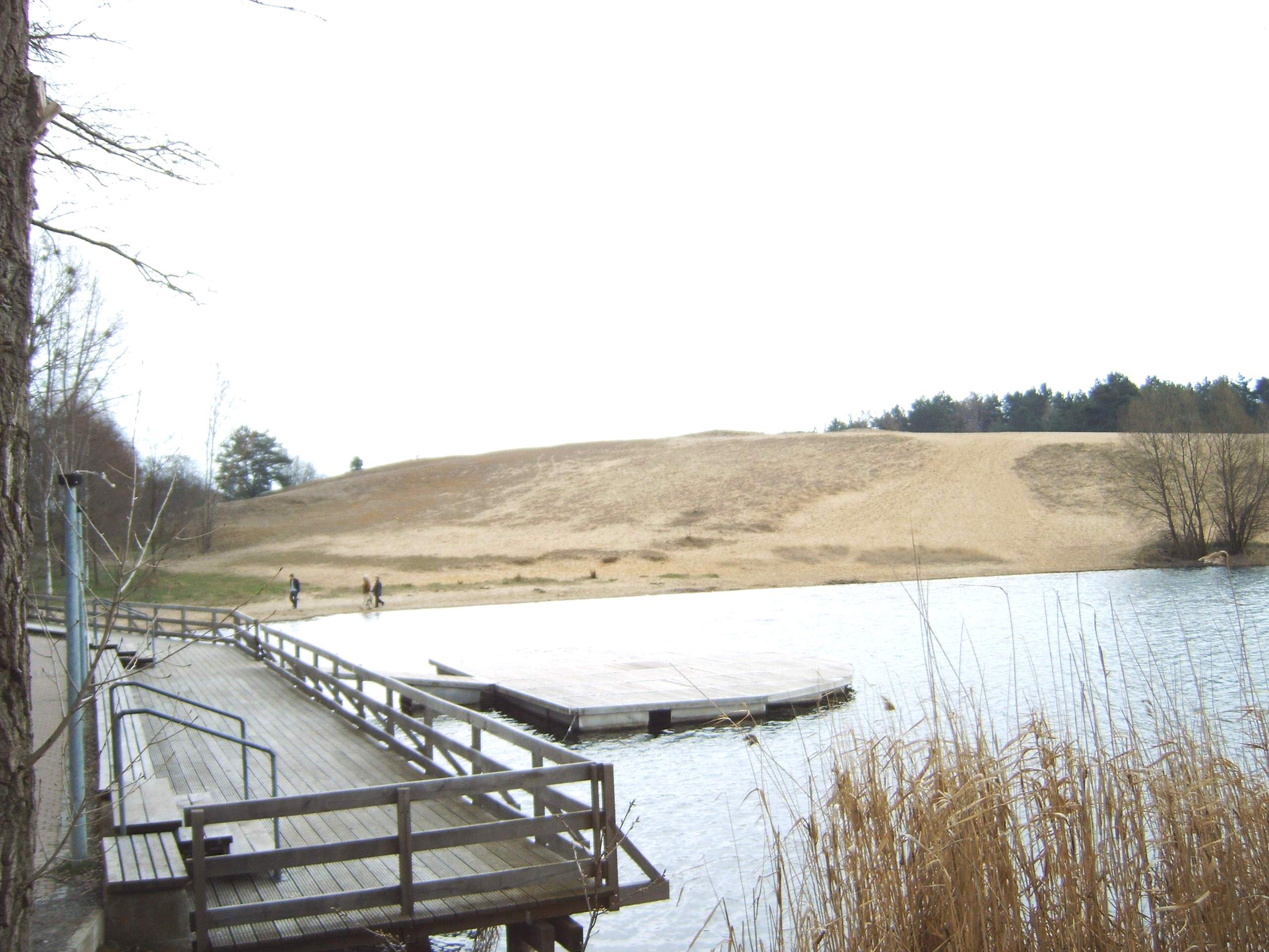 Sanddüne in Gommern Bild aufgenommen am 16.4.2006 Urheber: Olaf Meister